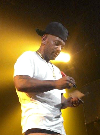 Prodigy au Melkweg à Amsterdam le 14-06-2014